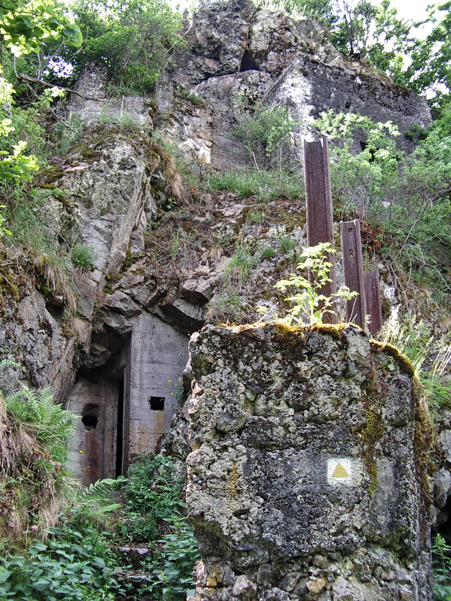 Position fortifiée allemande (Première Guerre mondiale) du "Rehfelsen" inférieur (Unterer Rehfelsen), sur les pentes de l'Hartmannswillerkopf, Alsace, France.